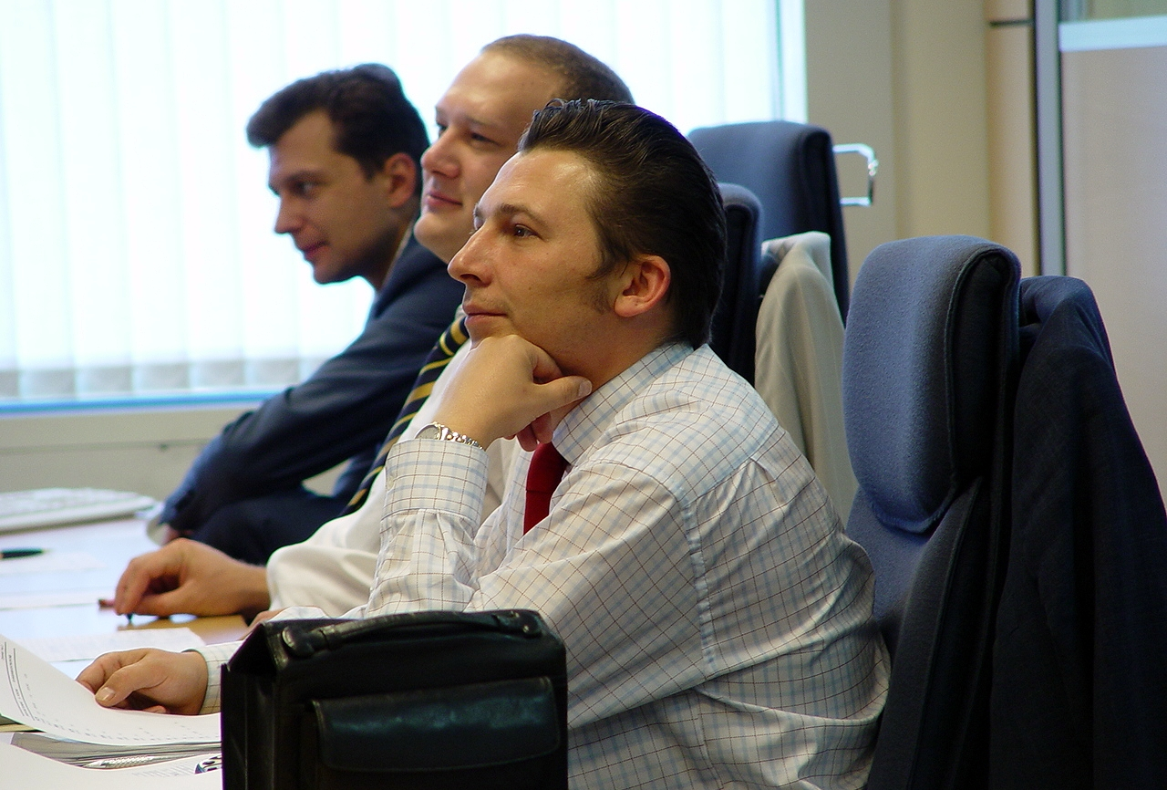 FOREX департамент в МДМ-Банке, 2004 г.